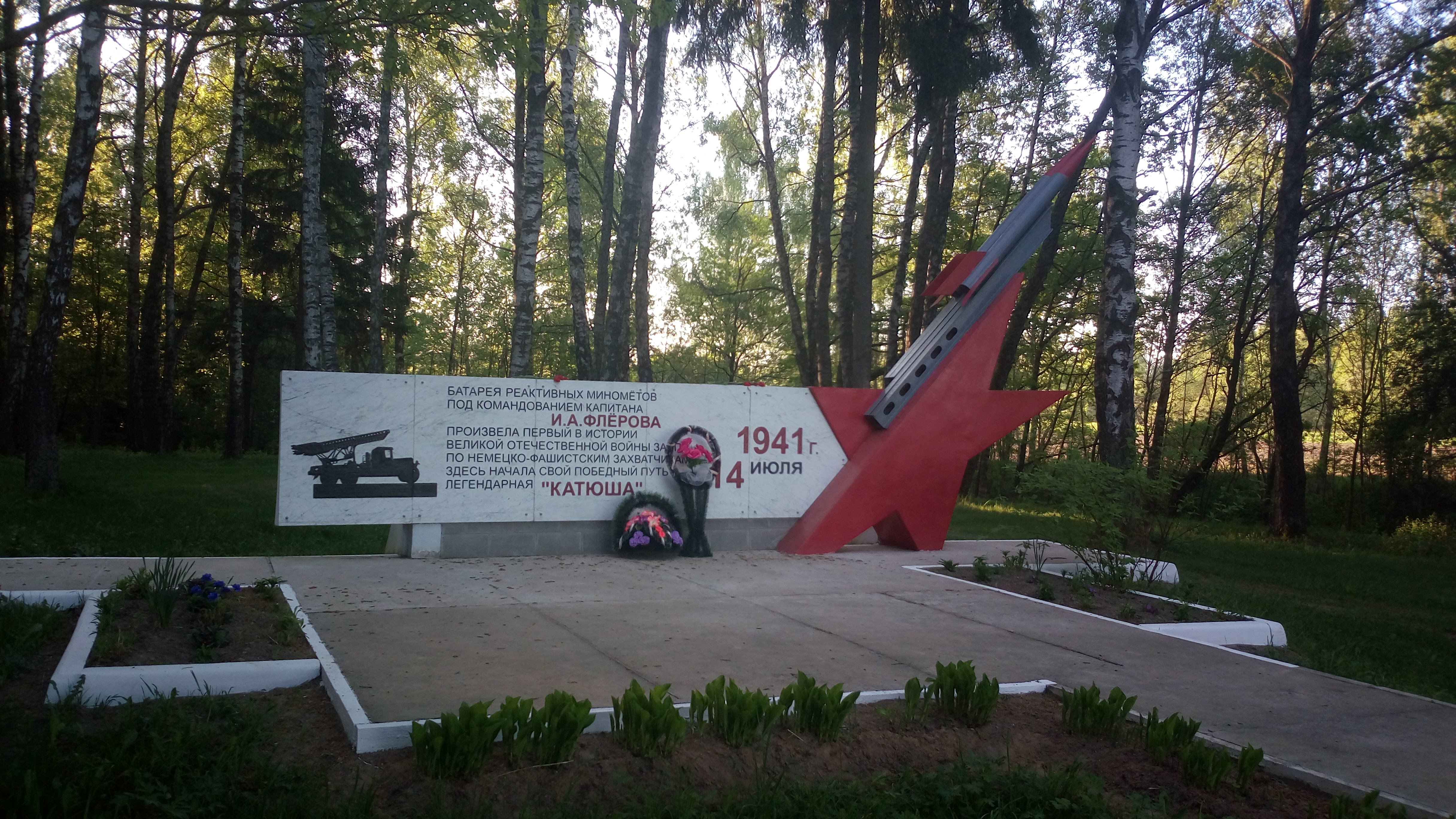 Мемориальный комплекс д. Пищалово, Оршанский район. Место первого применения установки БМ-13 "КАТЮША"